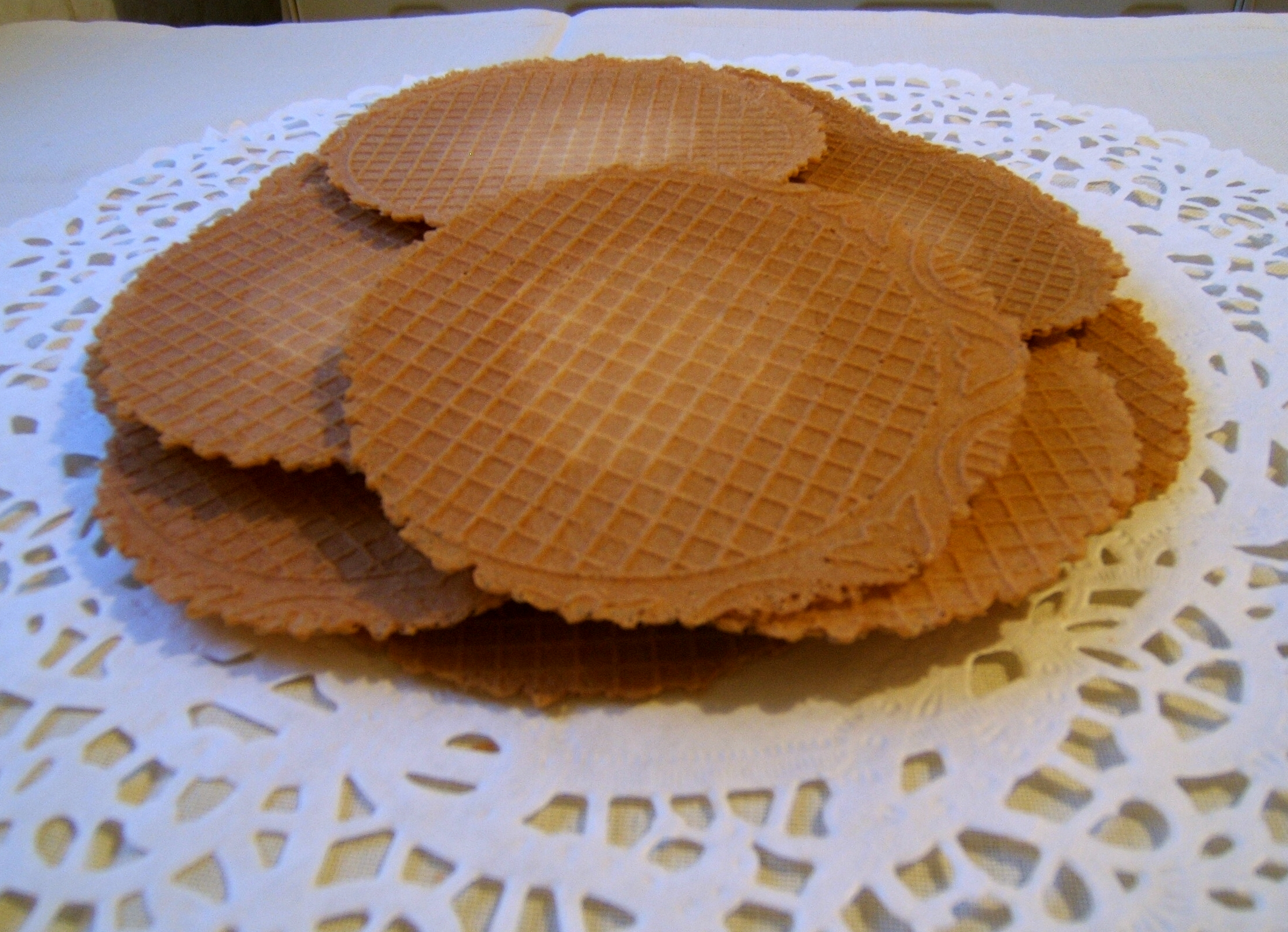 Zelfgebakken!